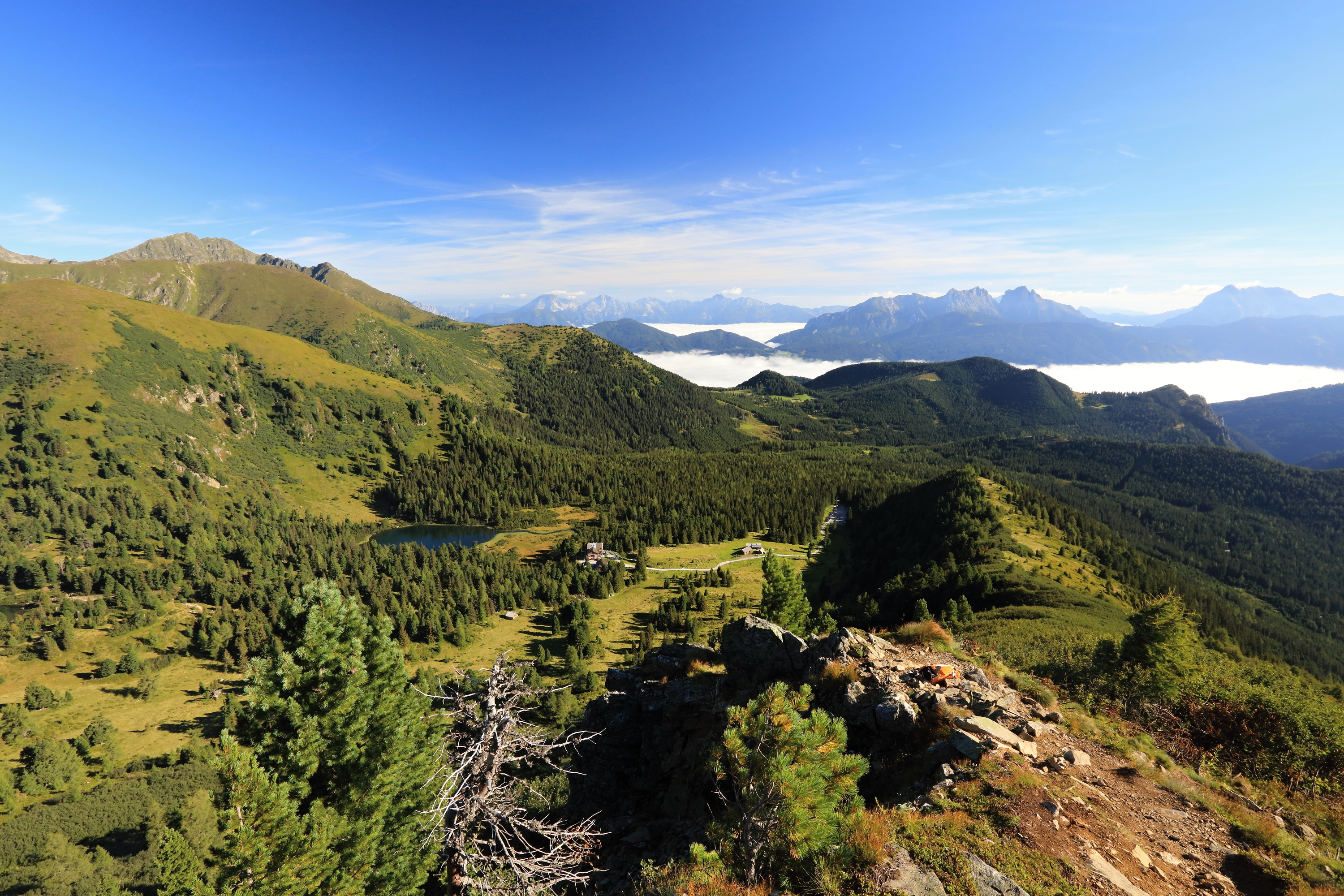 Gemeinde Hohentauern, 8785, Austria